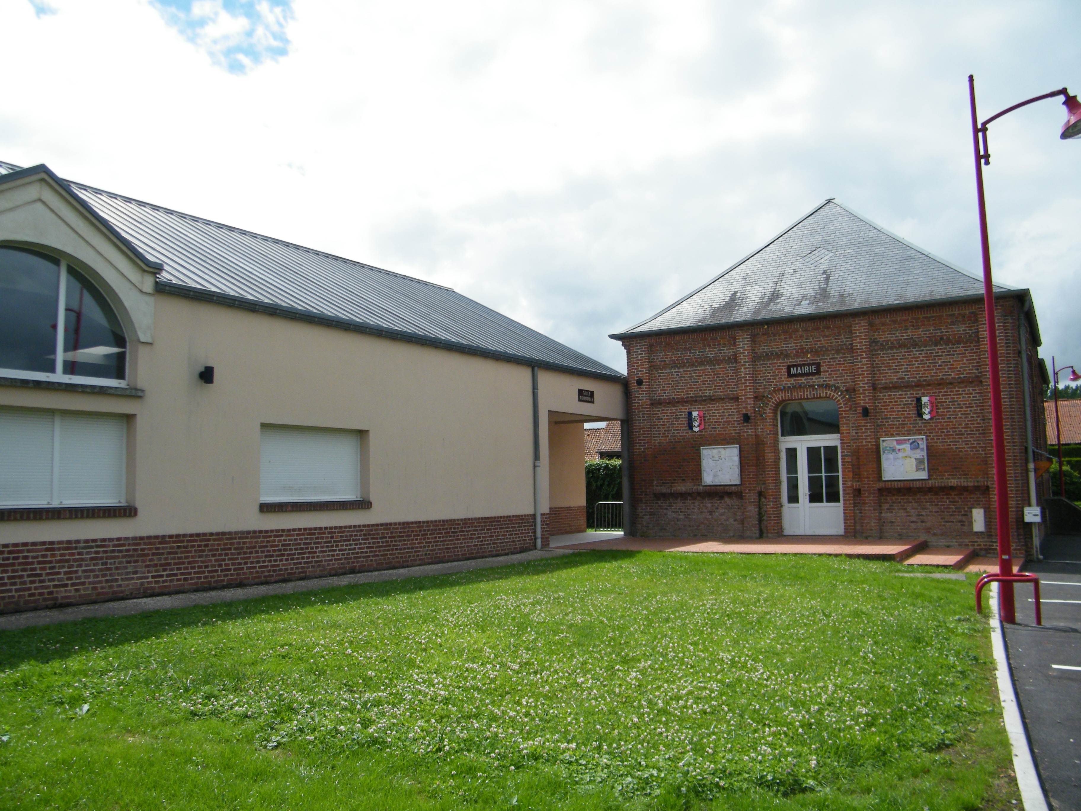 Salle communale et mairie.